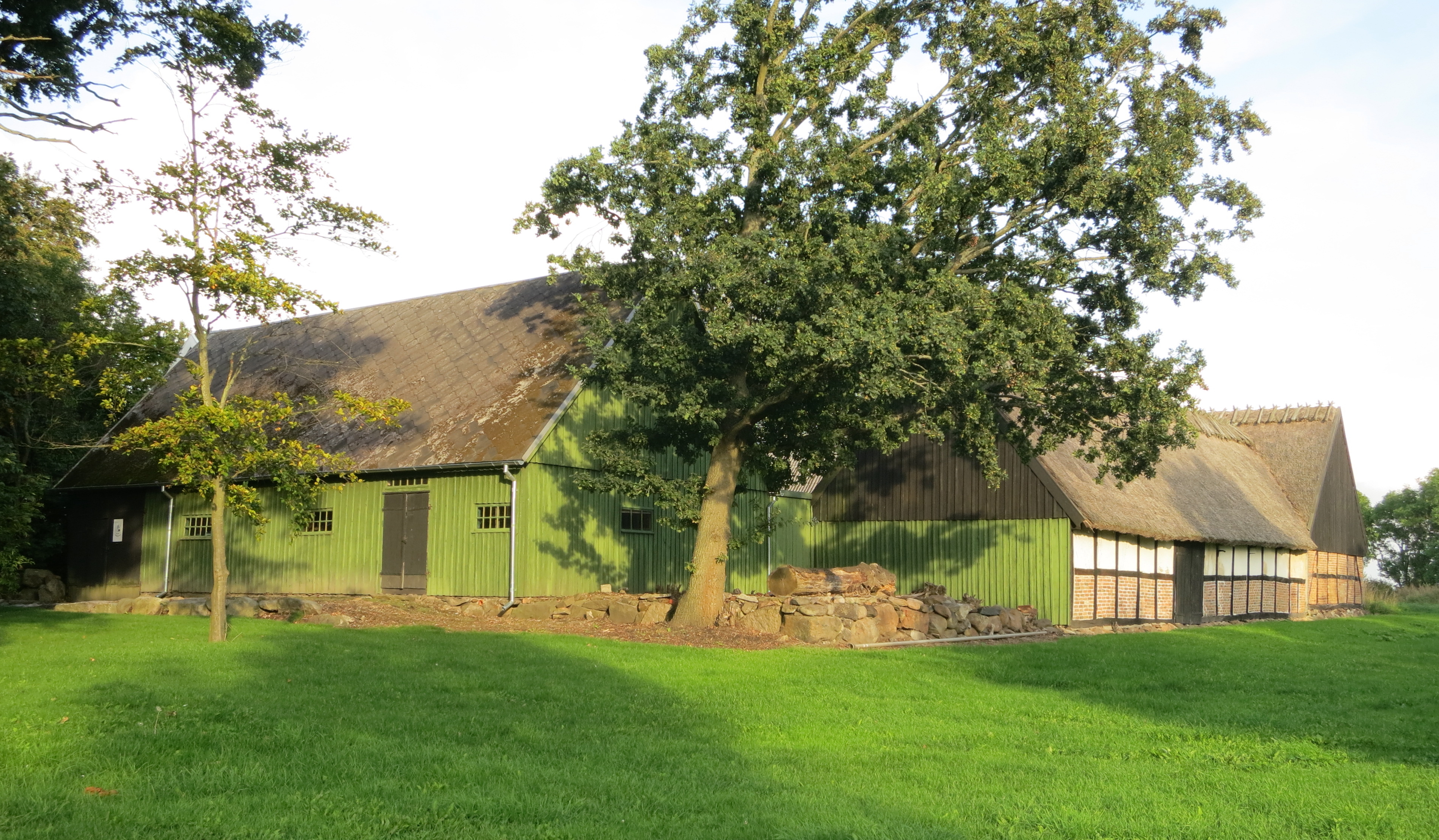 Hustoftagården (Hustofta 3:6)